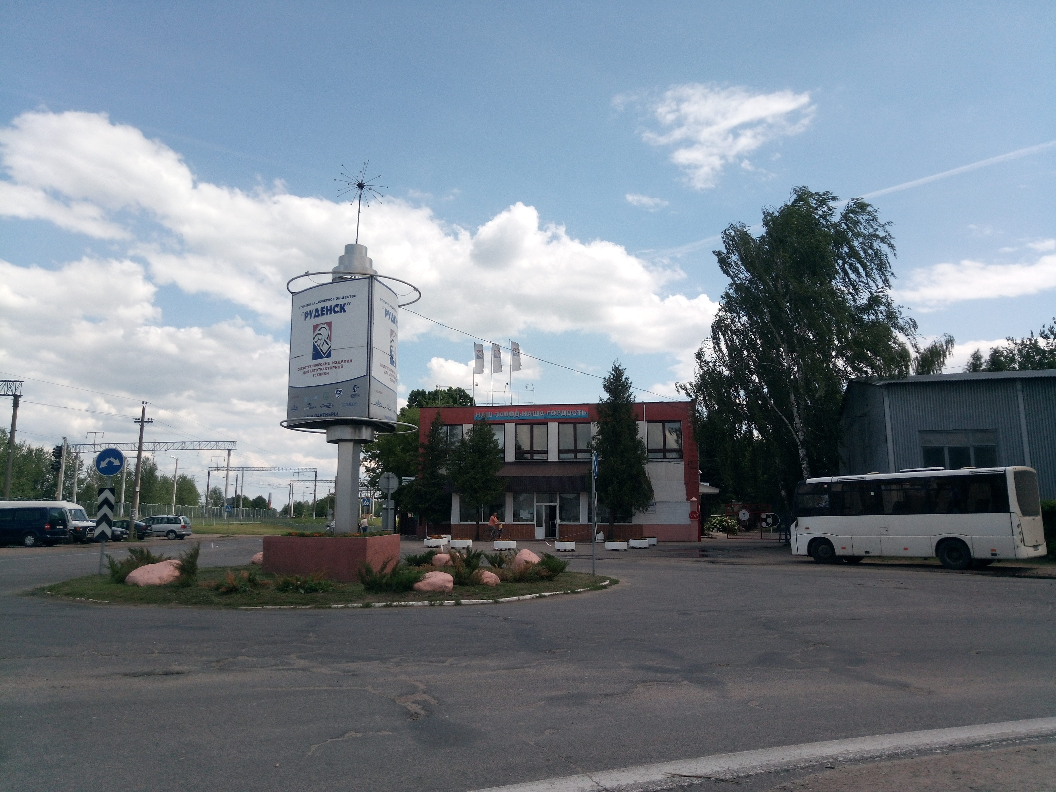 ААТ«Рудзенск».